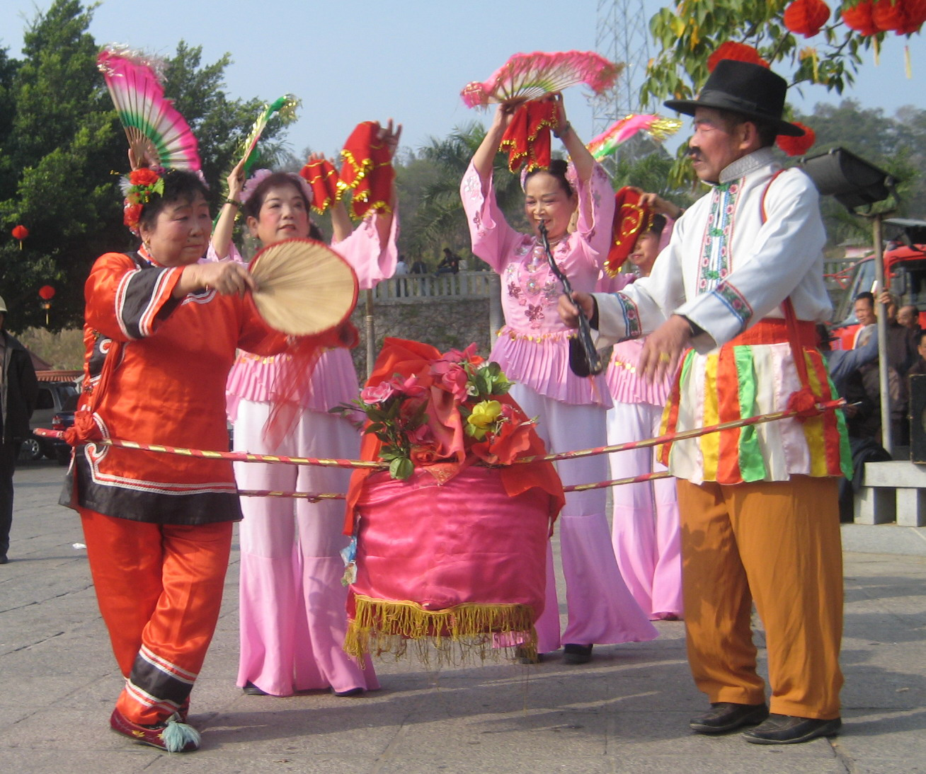 同安文车鼓表演